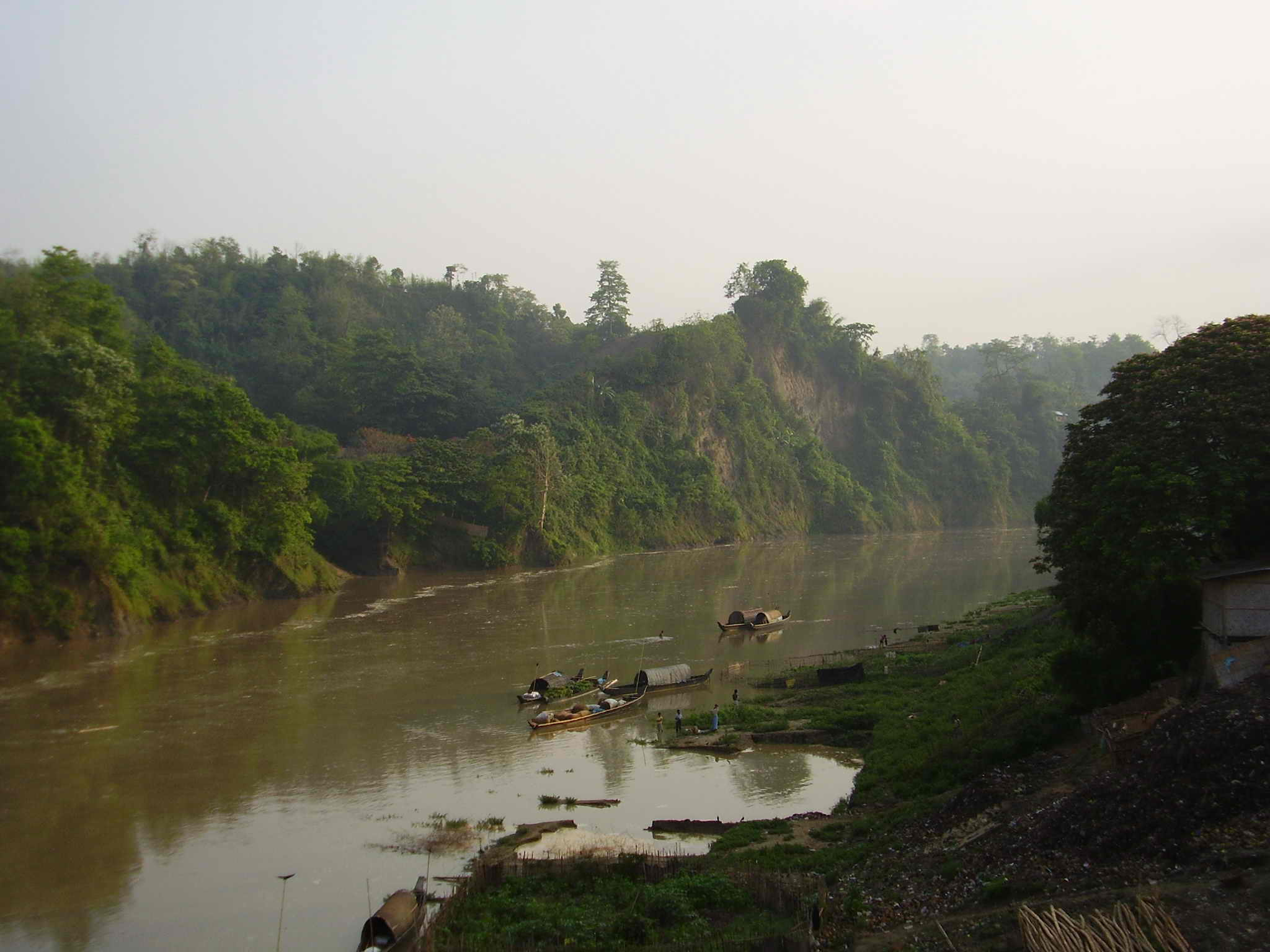 Shankha river in Bandarban (Ruma)